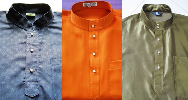 rekaan tiga, empat dan lima kancing baju Melayu.